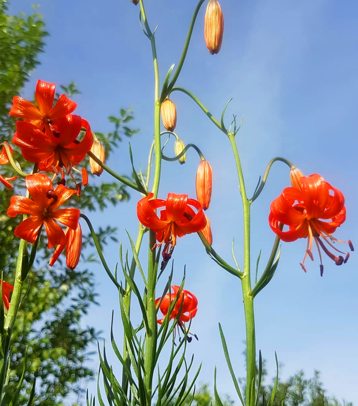 Lilium martagon. Eastern Siberia